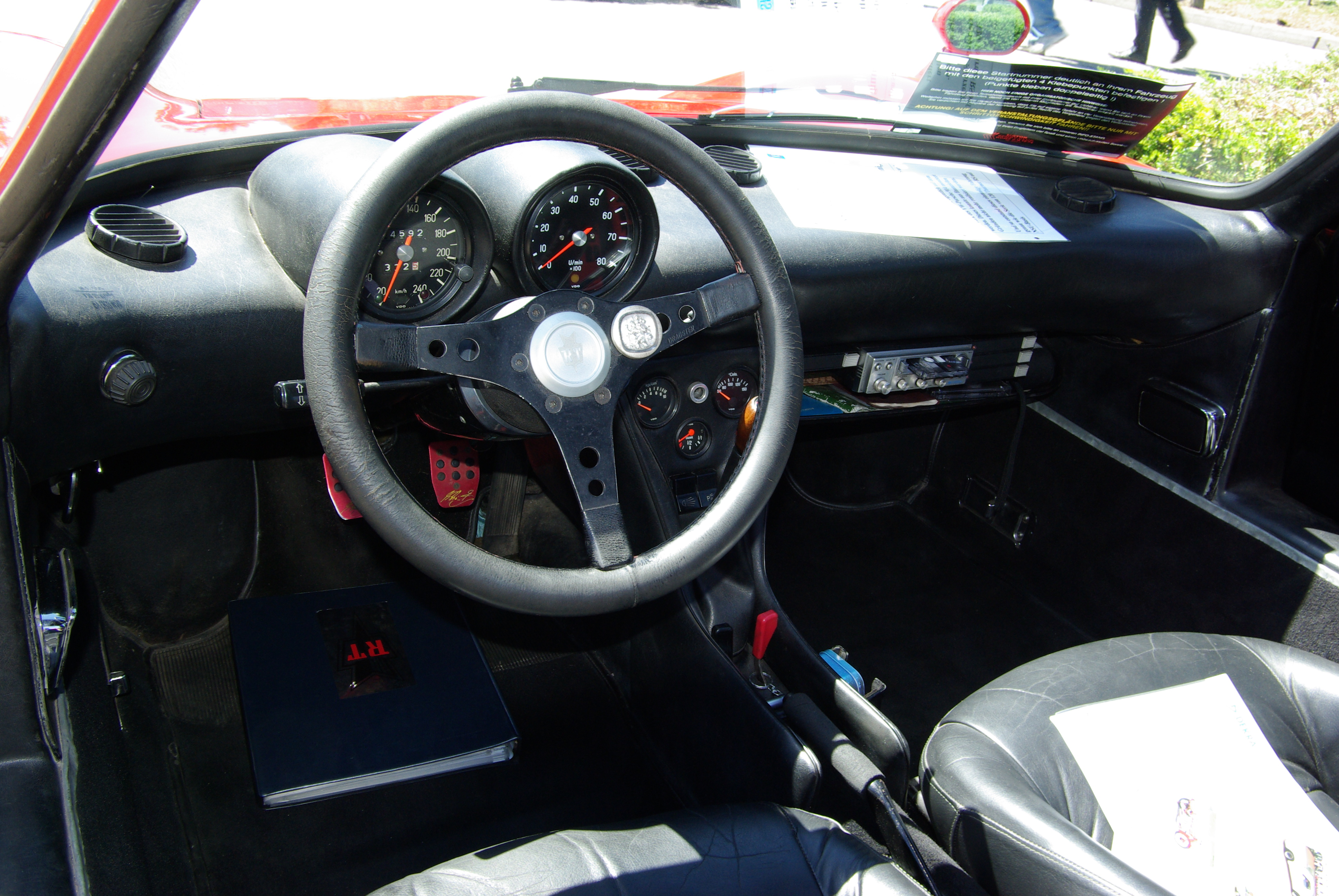 Thurner RS, Baujahr 1974, 75 PS aufgenommen bei / photographed at "Internationales Konzer Oldtimer-Treffen", 18. Juli 2010